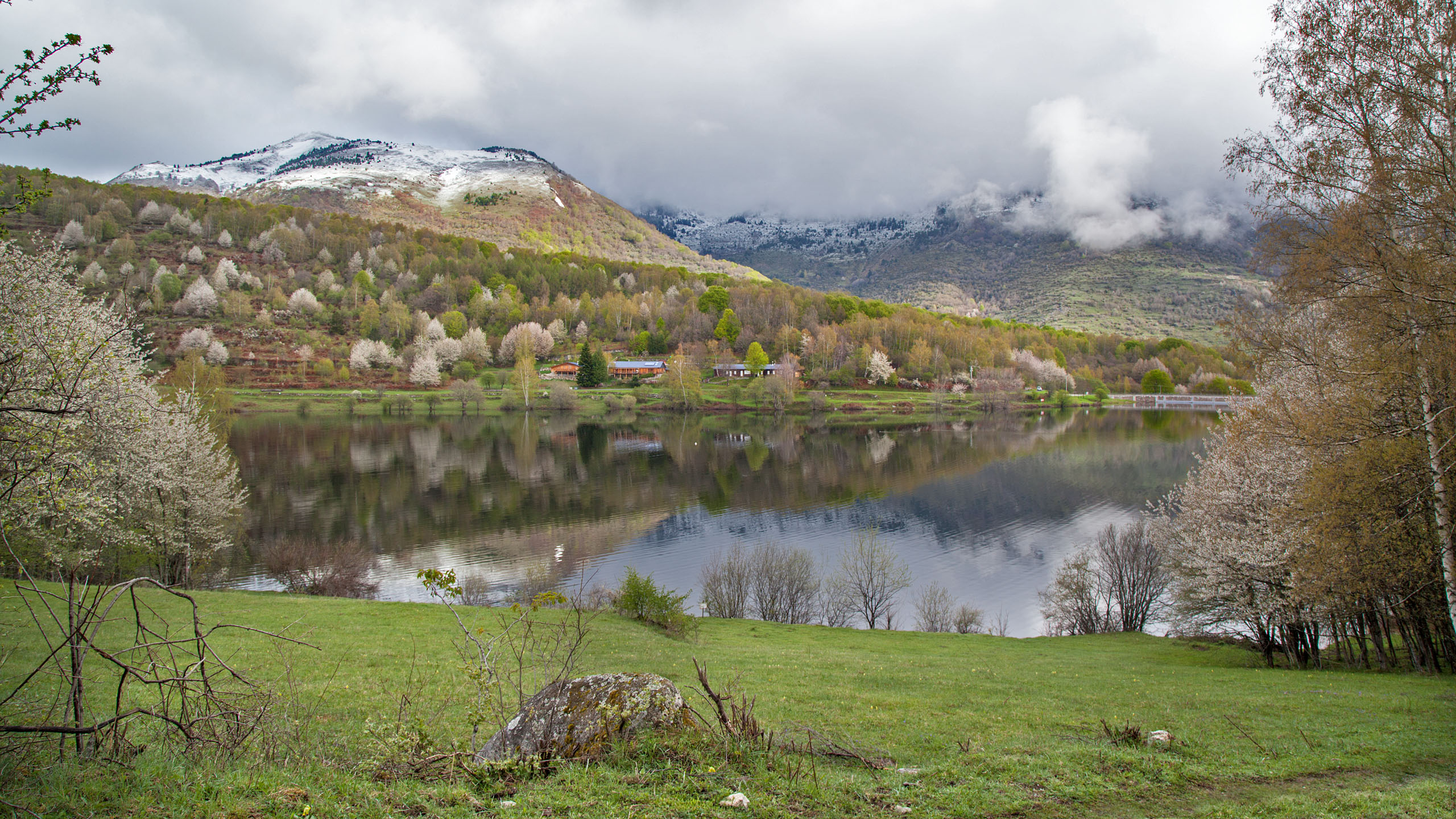 Lac vu du sud